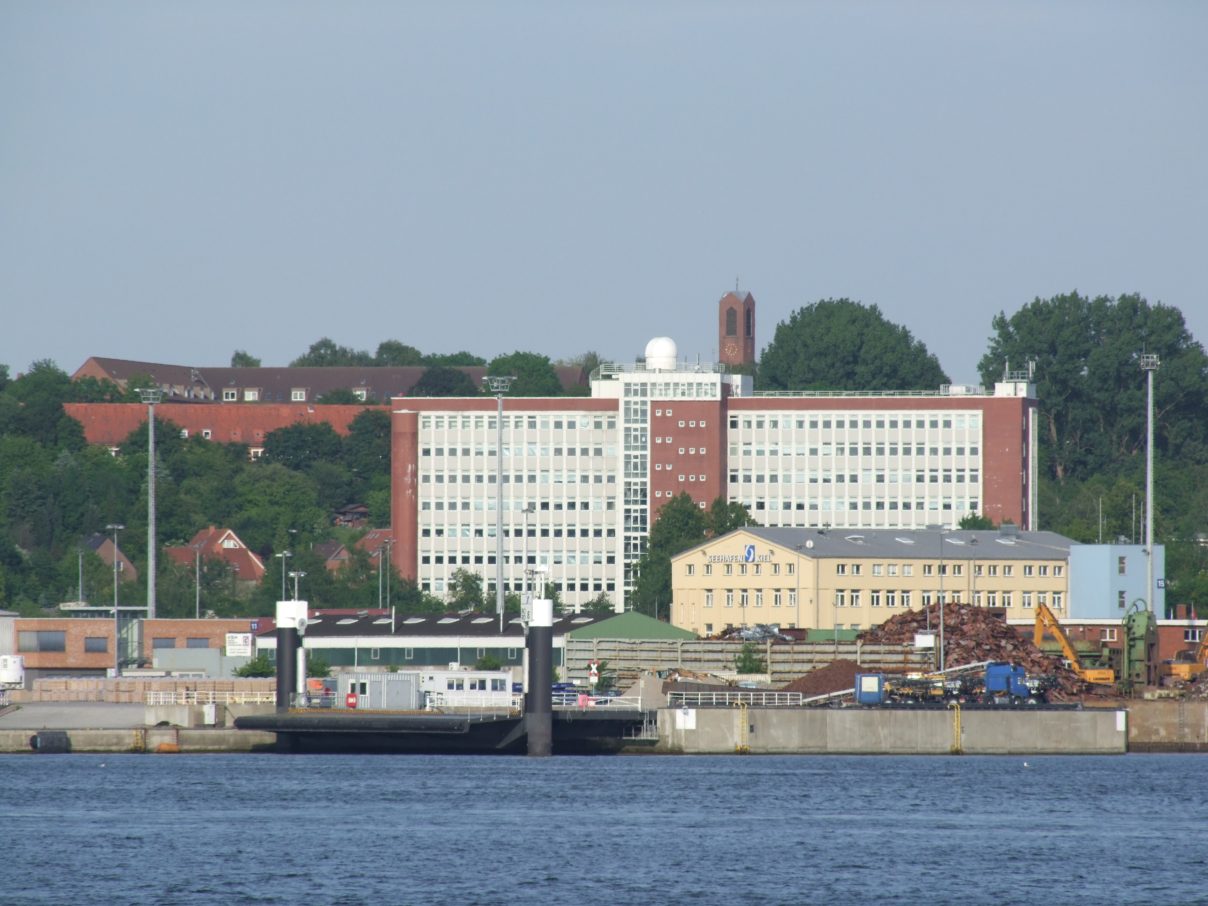 Das Hochhaus der Fachhochschule Kiel (FH Kiel) auf dem Ostufer im Stadtteil Neumühlen-Dietrichsdorf. Vetreten sind dort u.a. die Fachbereiche Wirtschaft und Soziale Arbeit und Gesundheit; im Vordergrund die Kieler Förde mit dem Seehafen Kiel. Das Gebäude der Fachhochschule wird im Hintergrund durch den Kirchturm der Paul-Gerhardt-Kirche Kiel überragt.